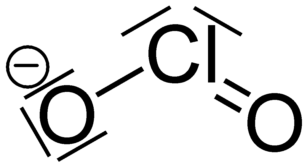 Struktur des Chloritions